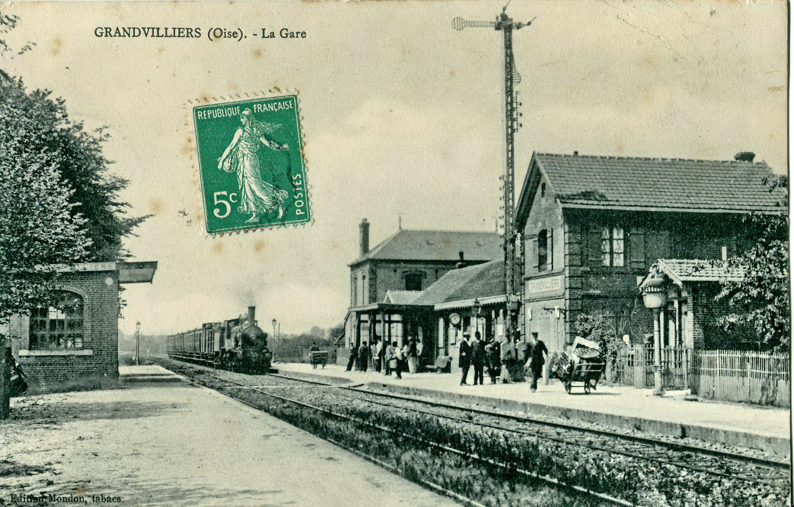 Carte postale ancienne éditée par Mondon Grandvilliers (Oise) : la Gare